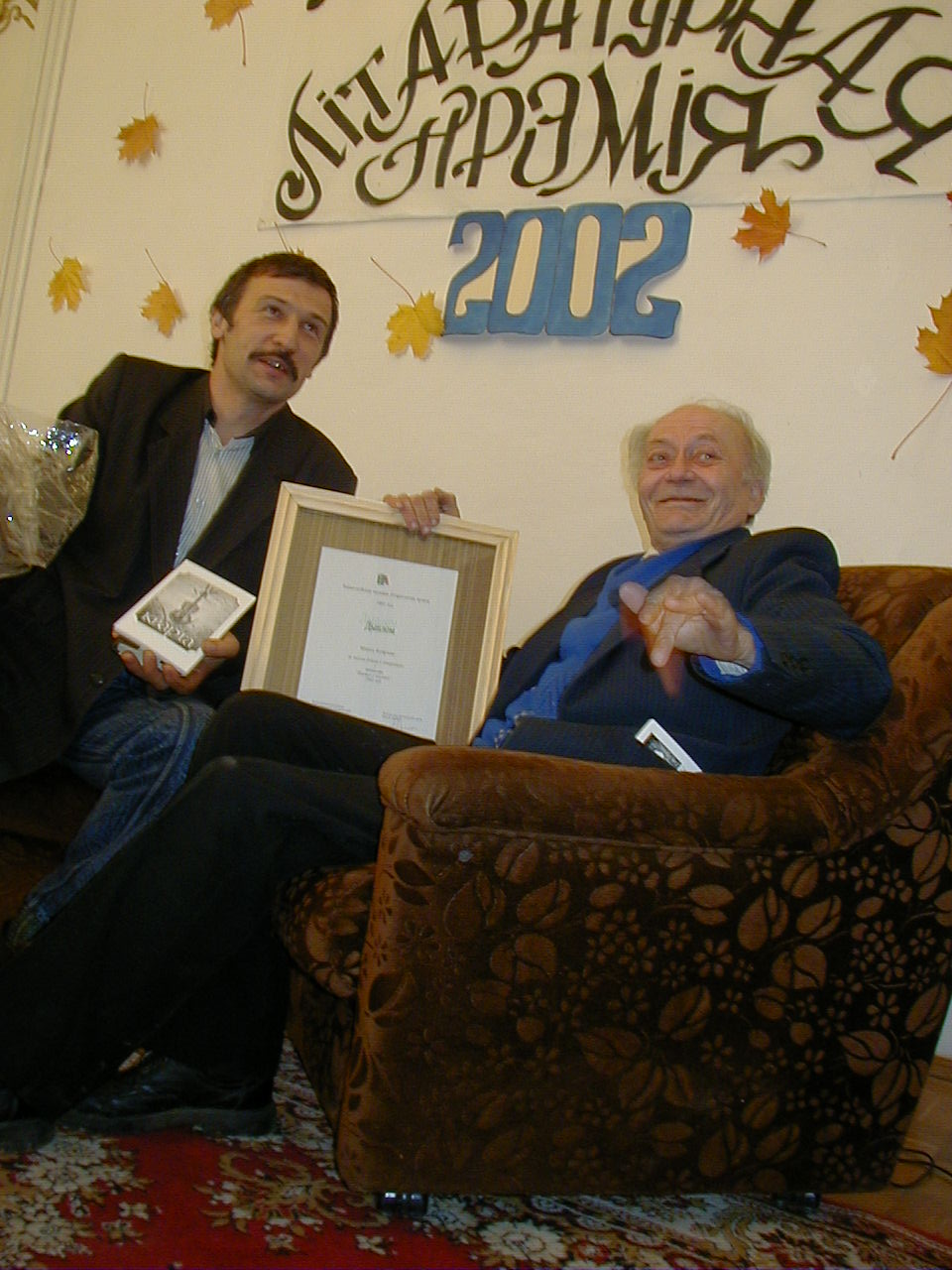 Беларуская (тарашкевіца): Мікола Папека і ляўрэат «Мядовае прэміі-2002» Мікола Купрэеў. Уручэньне прэміі ўпершыню адбывалася ў музэі-сядзібе «Пружанскі палацык»